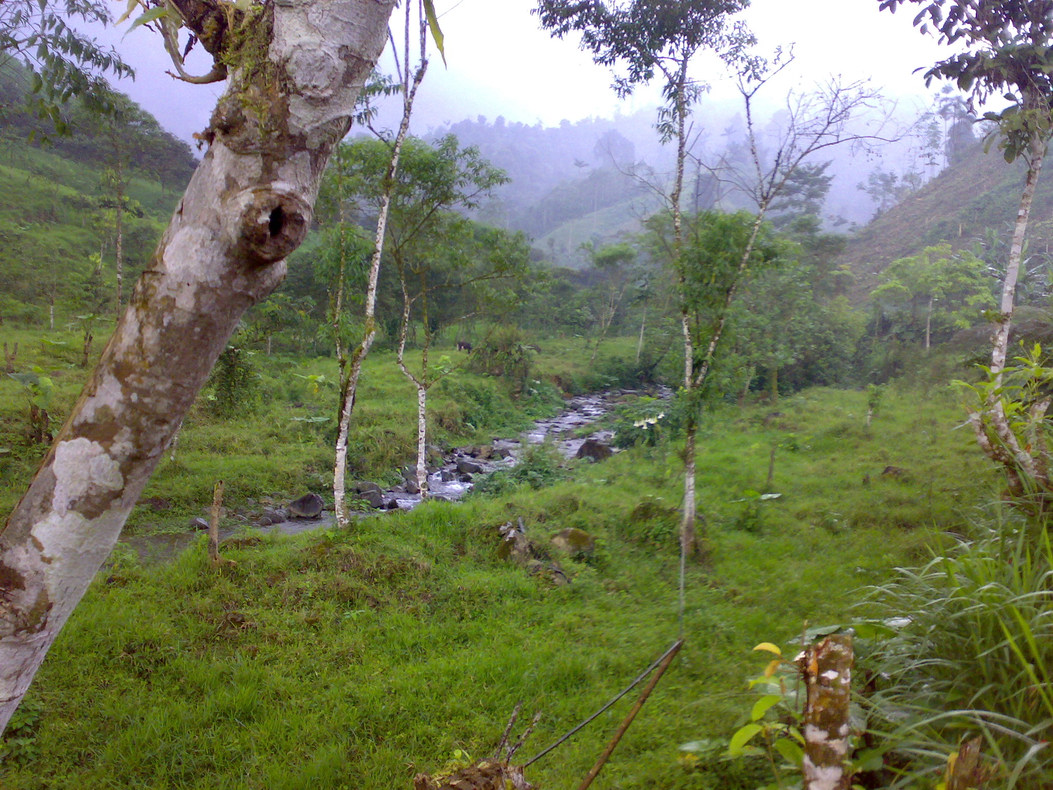 Biodiversidad